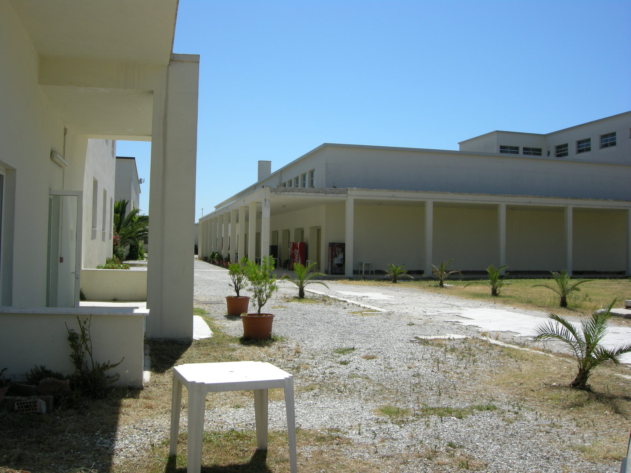 Colonia Torino